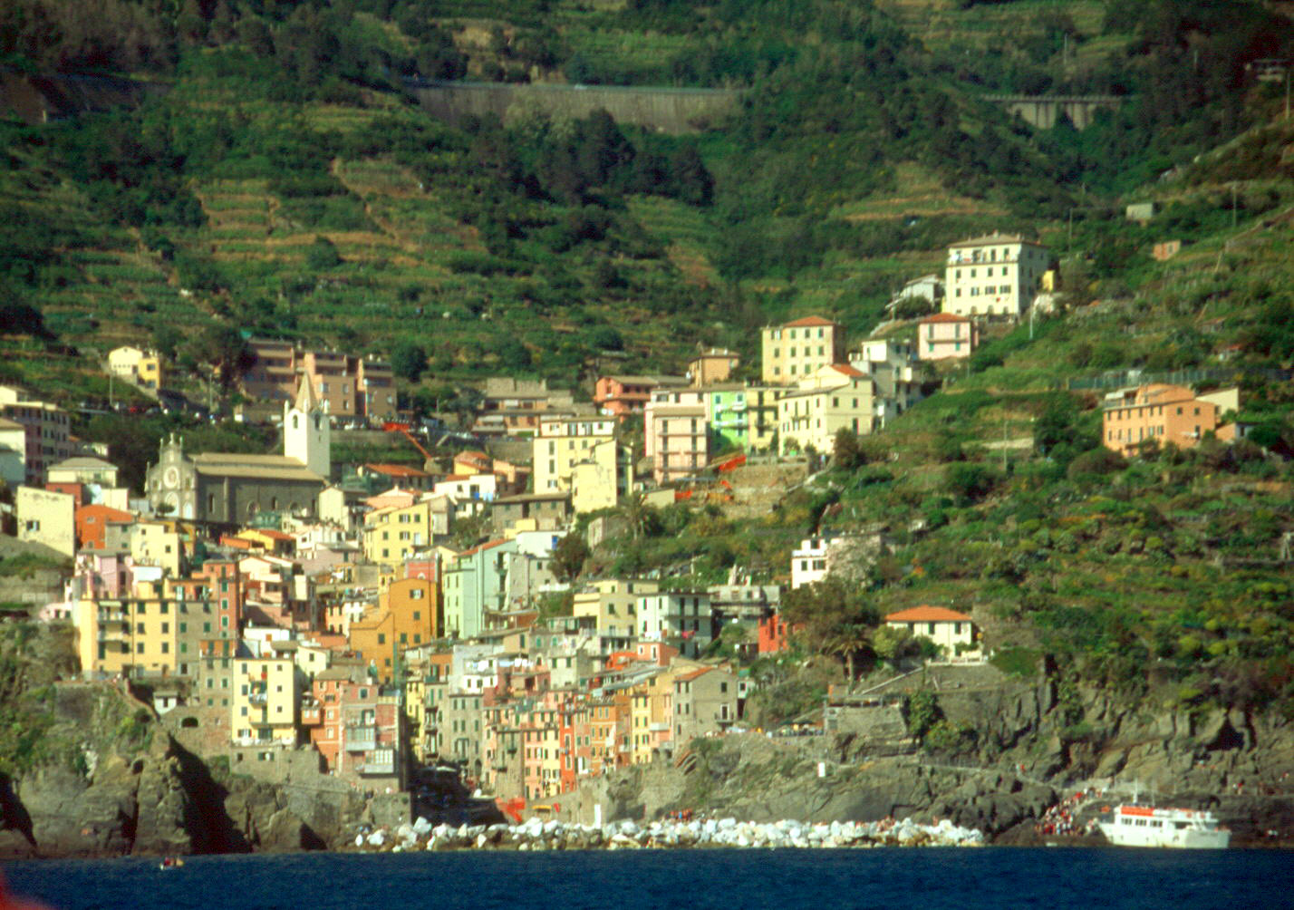 Riomaggiore 2004